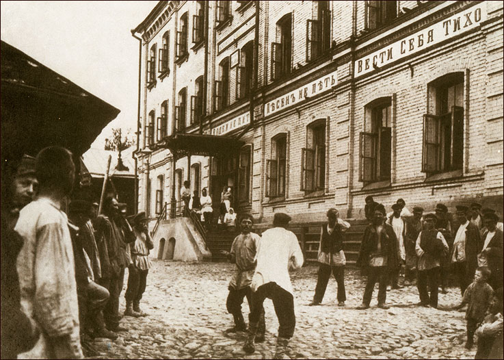 Ночлежный дом Бугровых в 1890-е